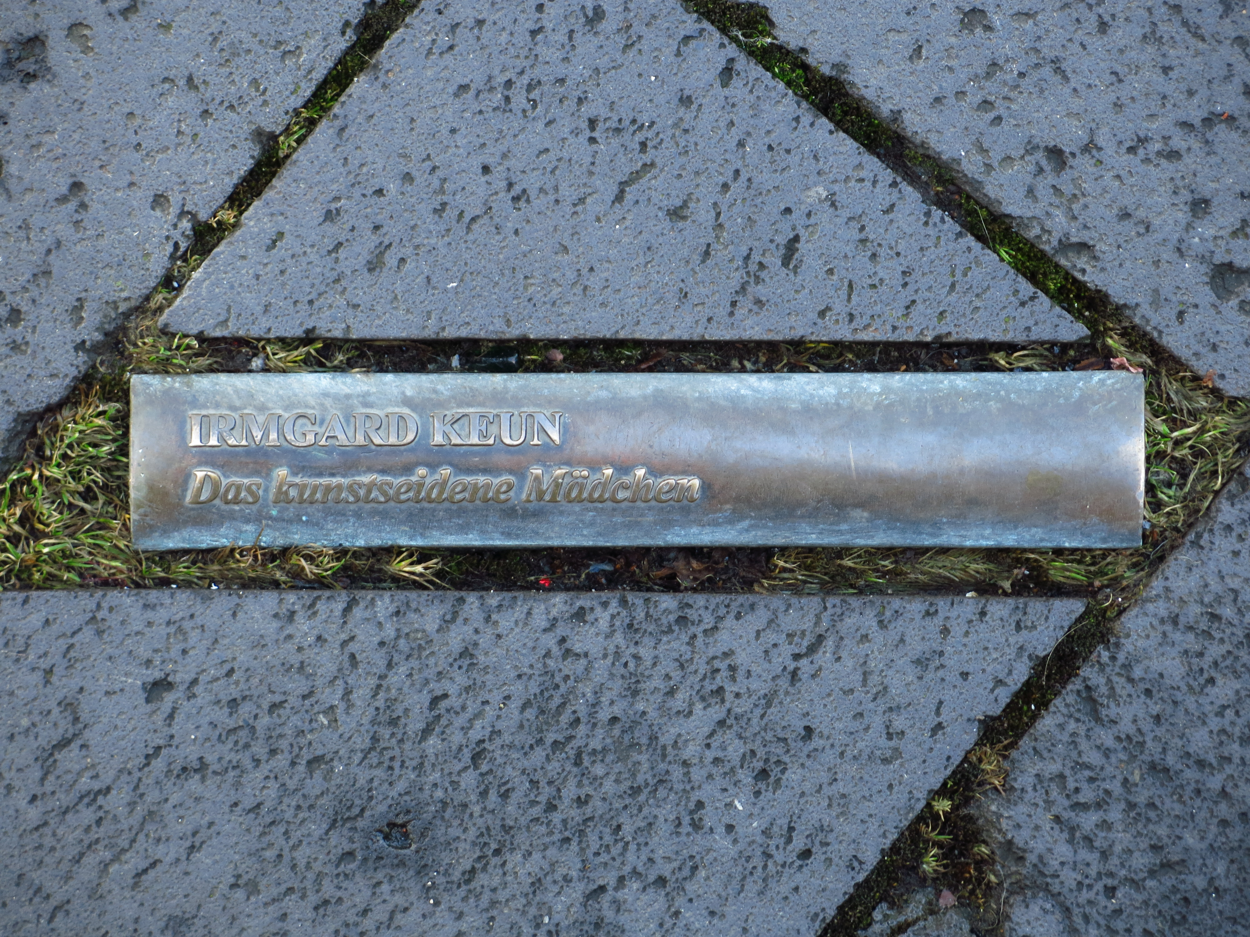 Das Mahnmal zur Bücherverbrennung auf dem Bonner Markt; In das Pflaster des Bonner Markt sind insgesamt 60 sichtbare Buchrücken, sogenannte „Lesezeichen“, verteilt, die sich an der Rathaustreppe, dem Ort an dem die Bücher am 10. Mai 1933 verbrannt wurden, verdichten. Zusätzlich wurde ein wetterfester Archiv-Behälter in Form einer Büchertruhe in den Platz eingelassen. Seine Inschrift benennt das Ereignis und weitere Autoren von verbrannten Büchern.